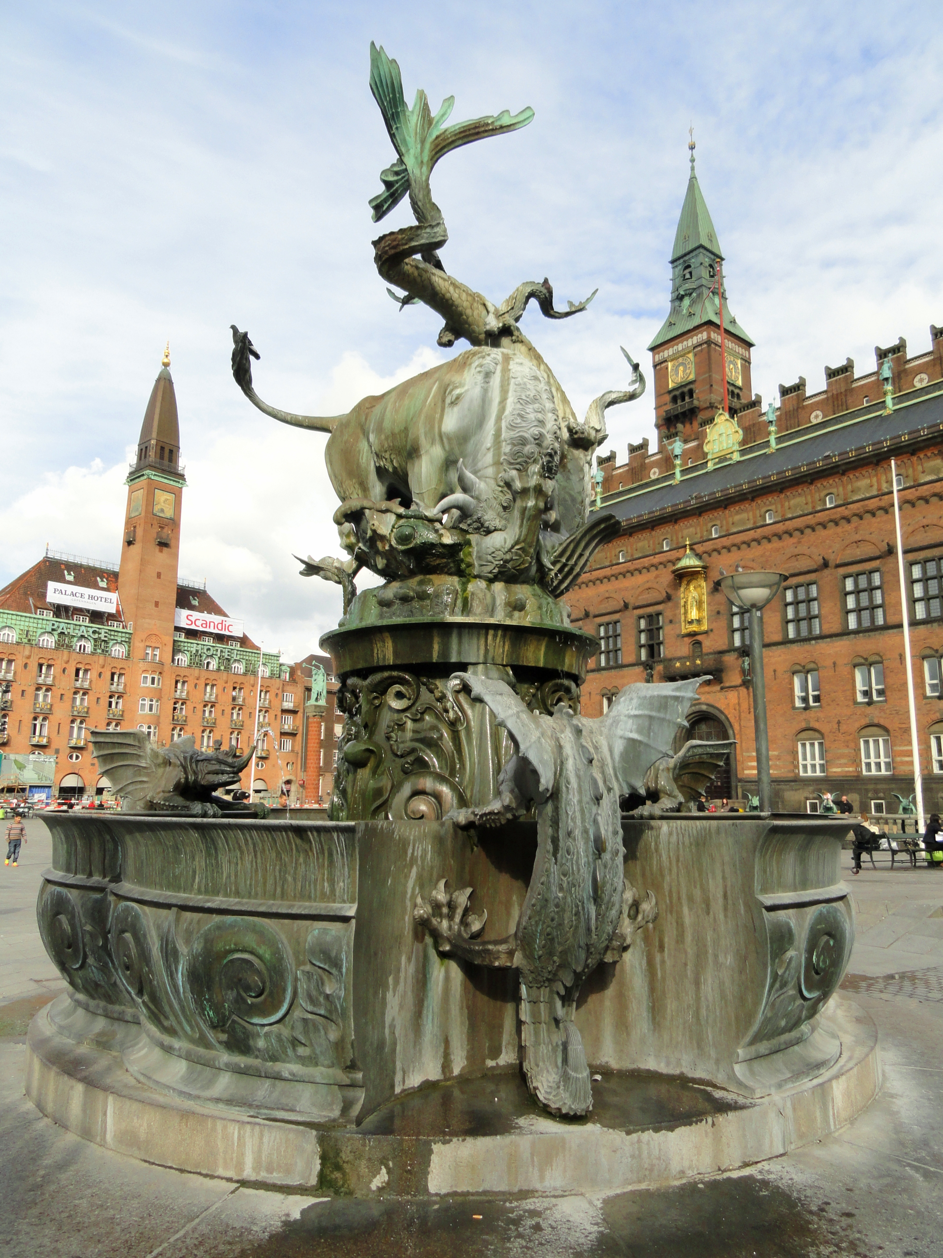 Dragon Fountain, Copenhagen, Denmark.